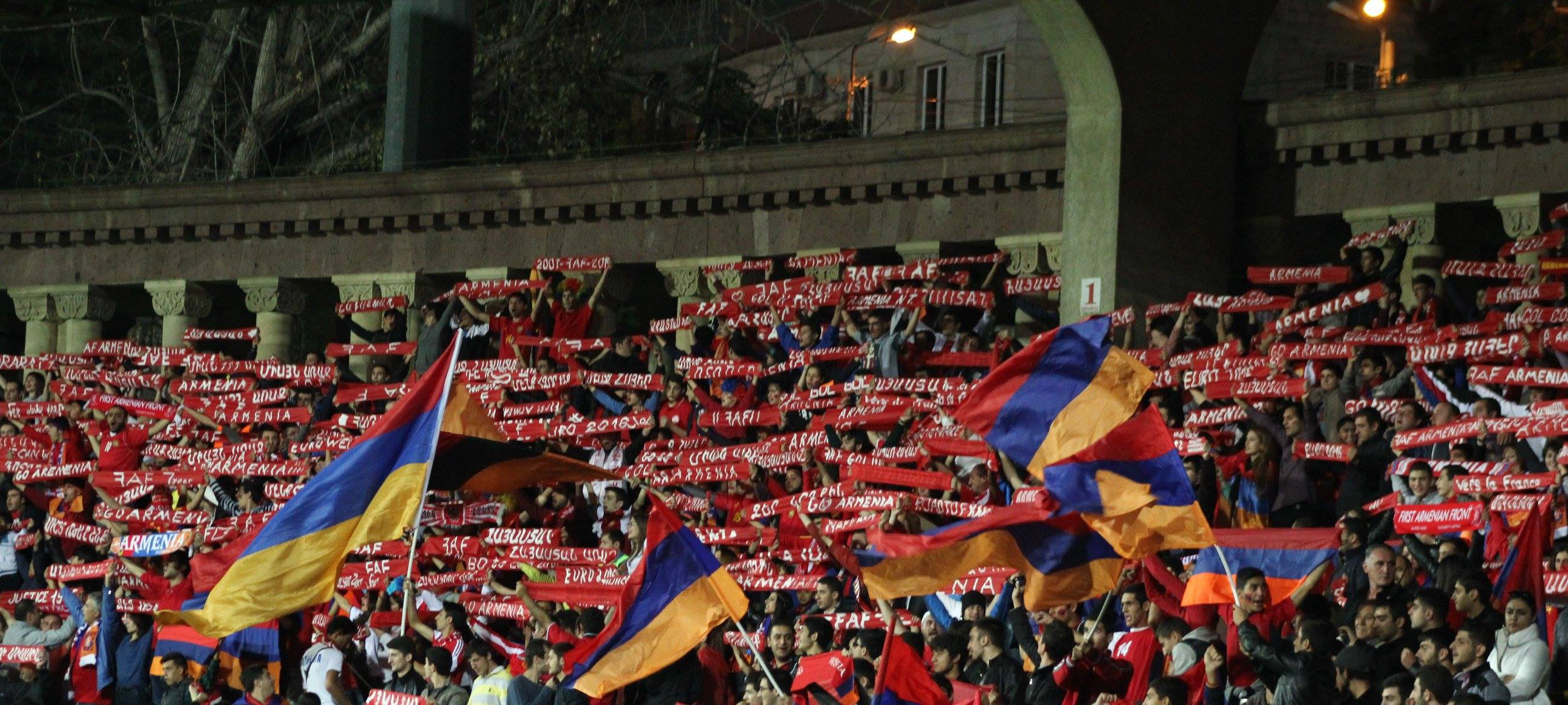 FAF-ը հանդիպման ժամանակ